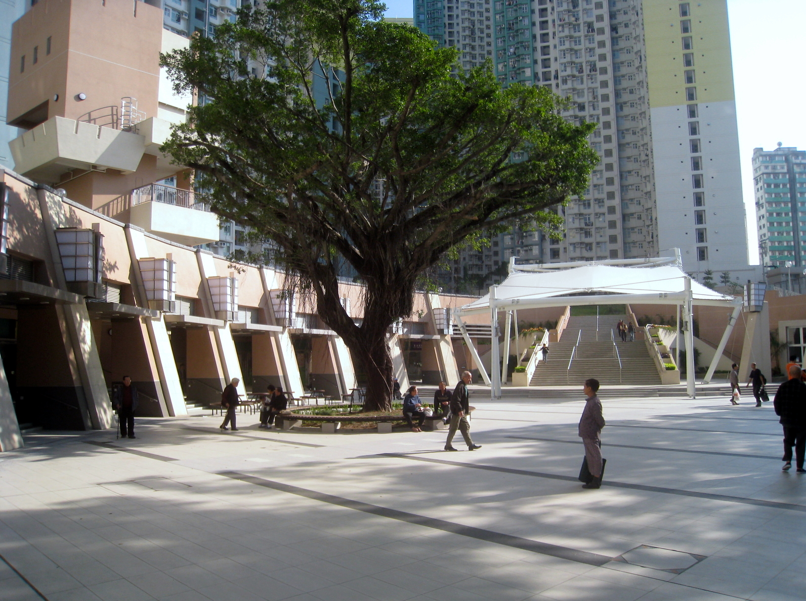 Upper Ngau Tau Kok Estate Entry Plaza 牛頭角上邨